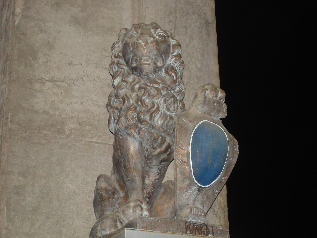 Leao Avai